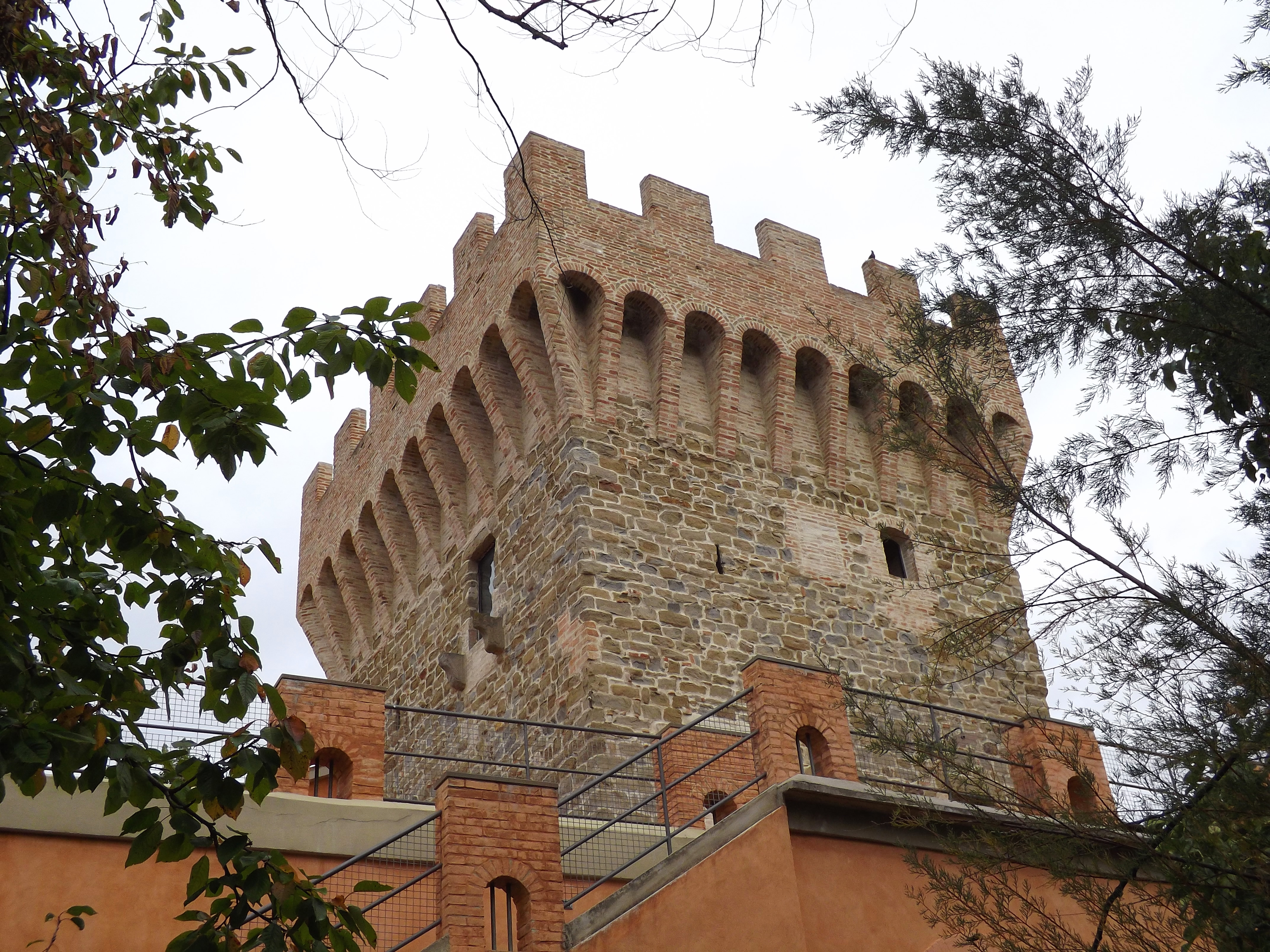 Torre del Molino della Catasta - Bosco didattico This is a photo of a monument which is part of cultural heritage of Italy.